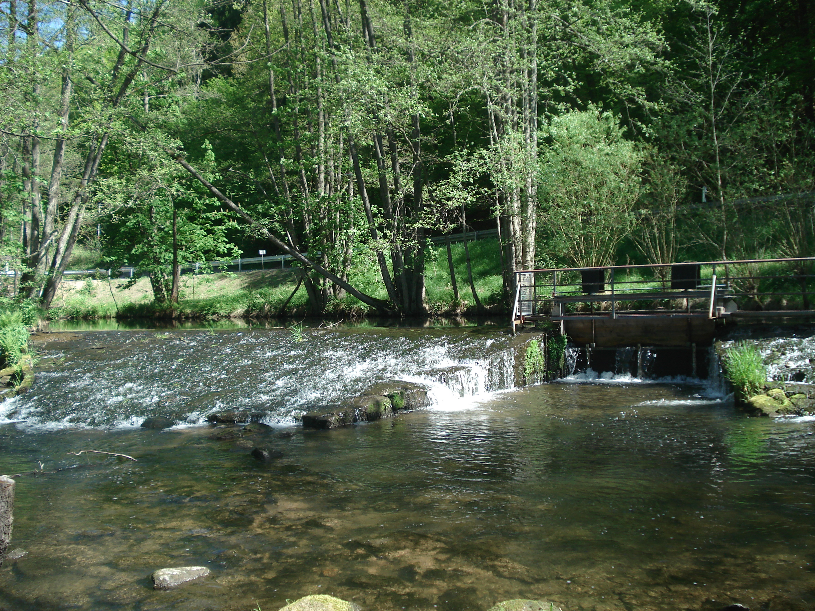 Ein Wehr an der Hafenlohr bei Windheim